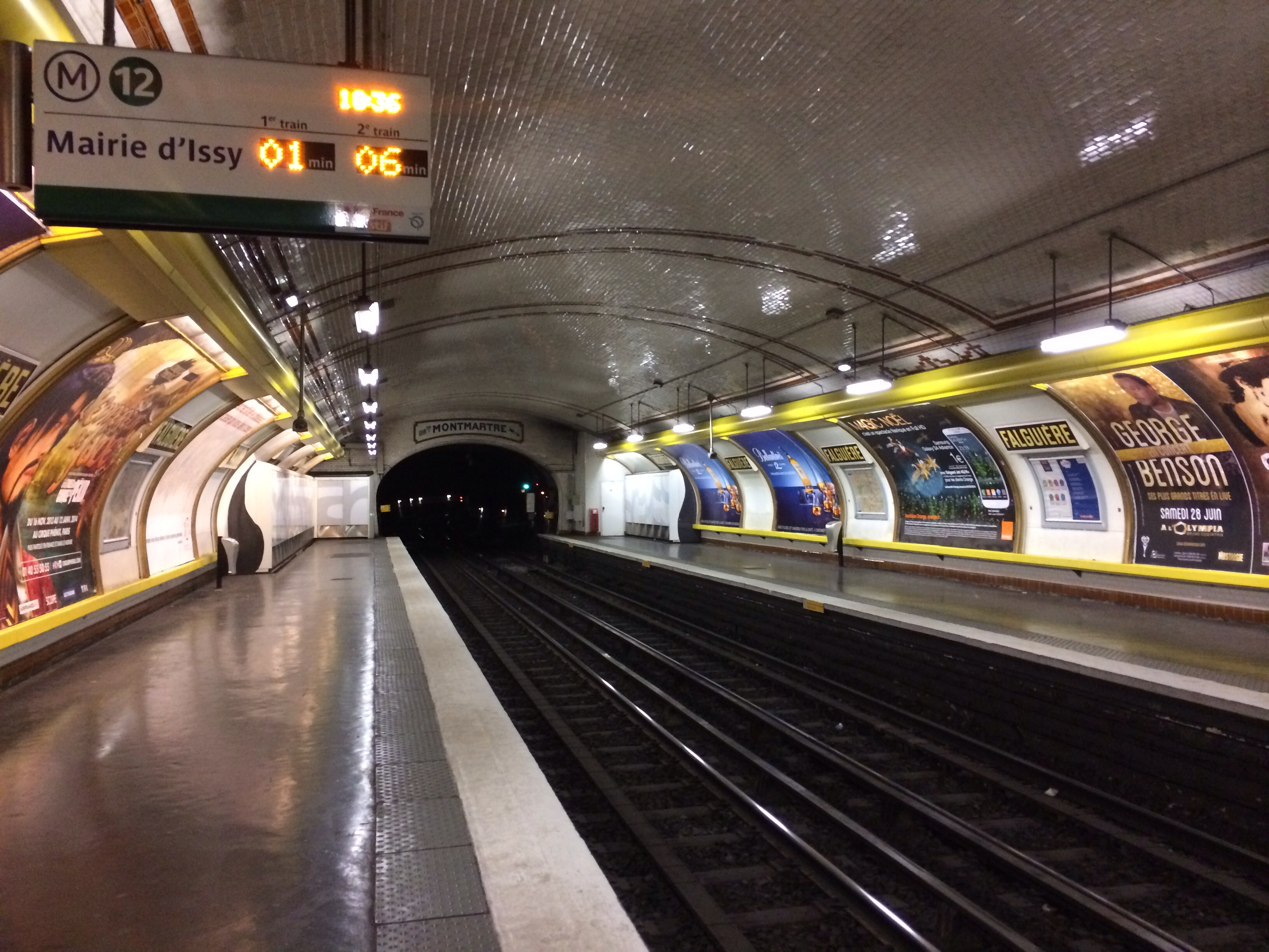 Station Falguière, ligne 12 du métro de Paris